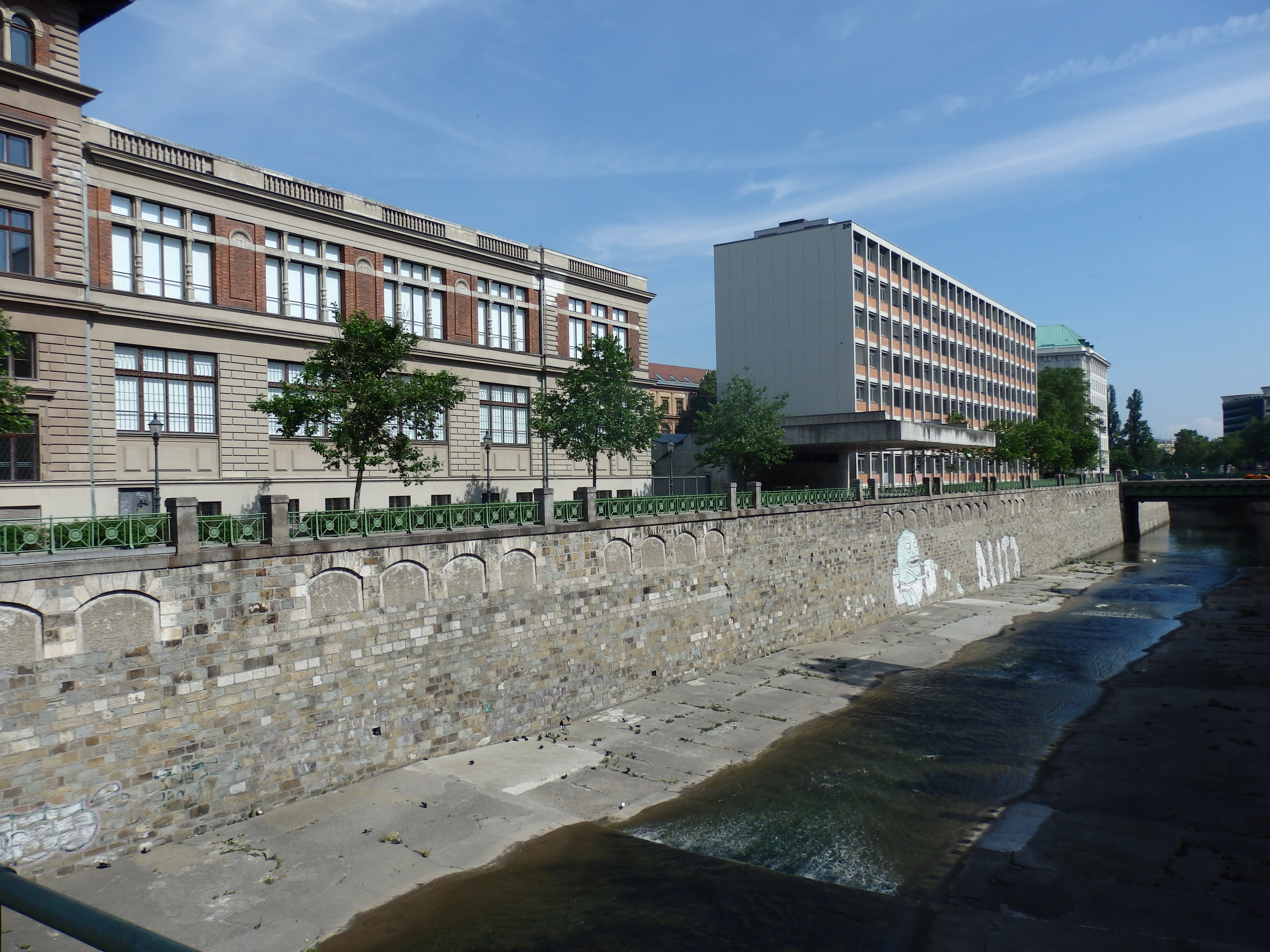 Fritz-Wotruba-Promenade von der Stubenbrücke aus, Wien-Innere Stadt